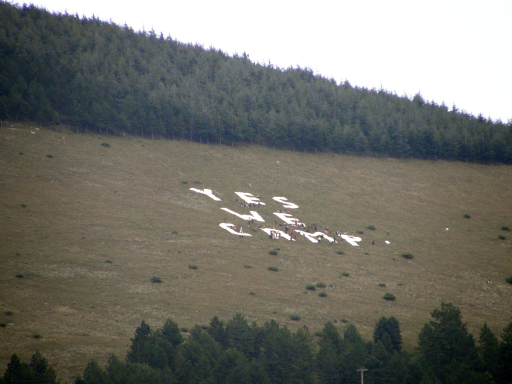 Yes we camp!